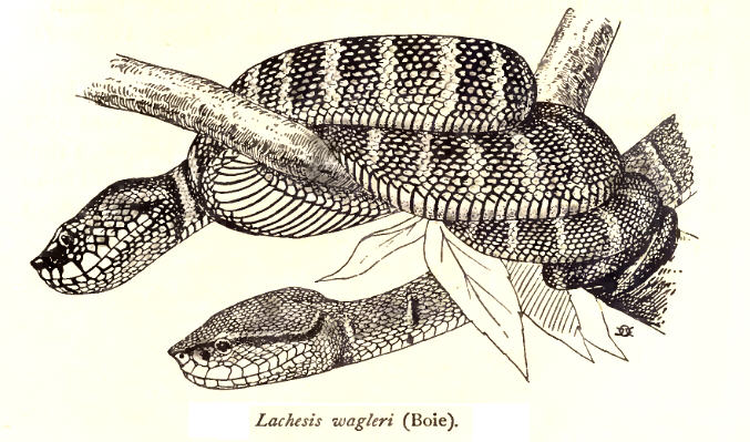 Lachesis wagleri, Wagler's Pit Viper, Tropidolaemus wagleri